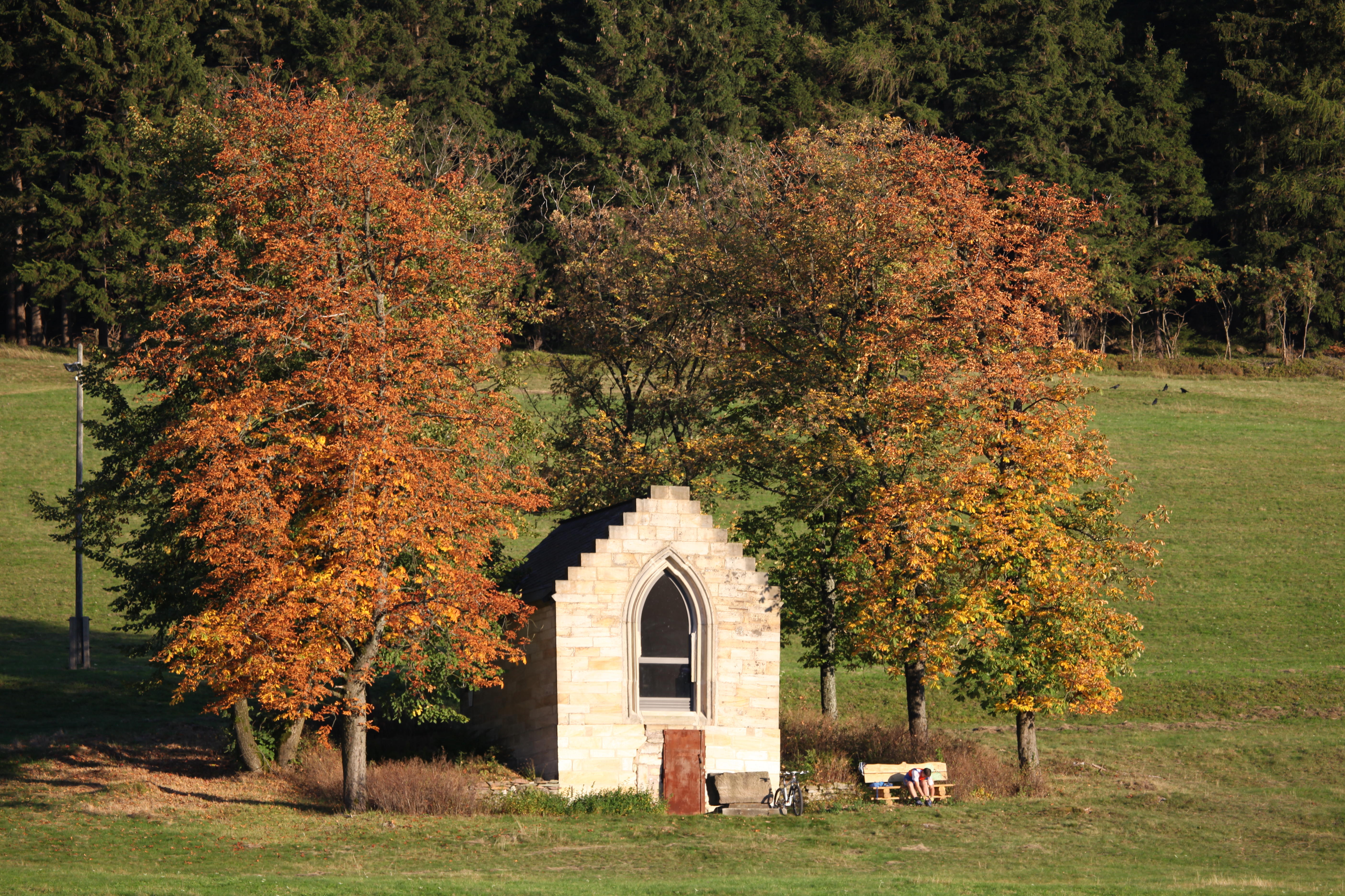 Grabkapelle der Familie Greiner, Limbach OT von Steinheid, Nordwesthang des Petersberges